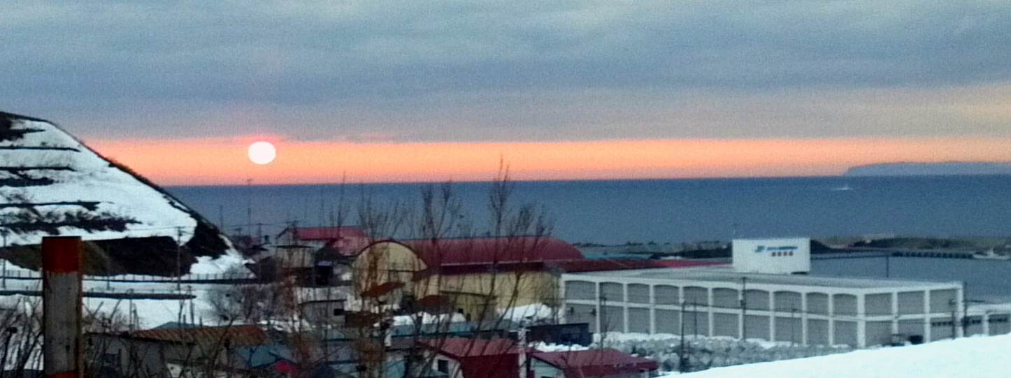 苫前港の夕日